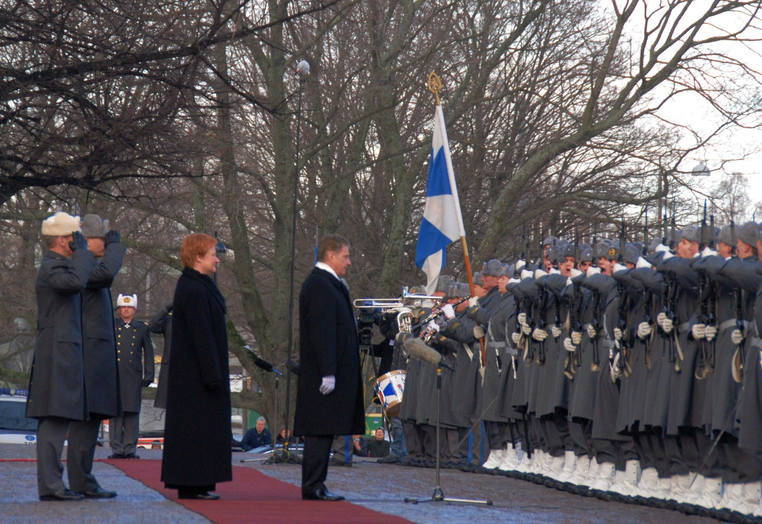 Tasavallan uusi presidentti Sauli Niinistö tarkastaa kunniankomppanian. Sotilaat Kaartin jääkärirykmentin sotilaspoliisikommppaniasta.